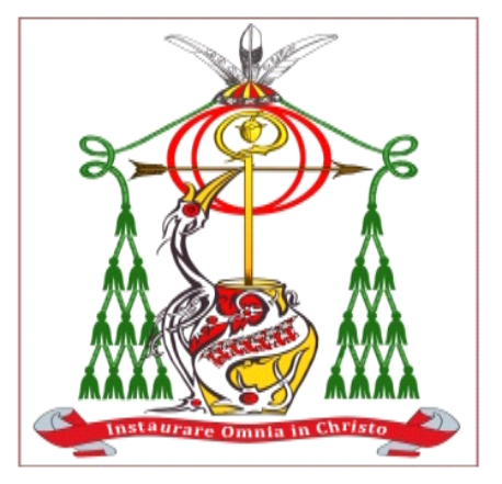 Masa Mgr. Agustinus Agus